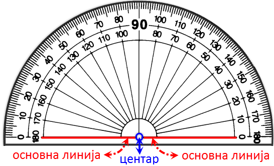 Агломер полукружен